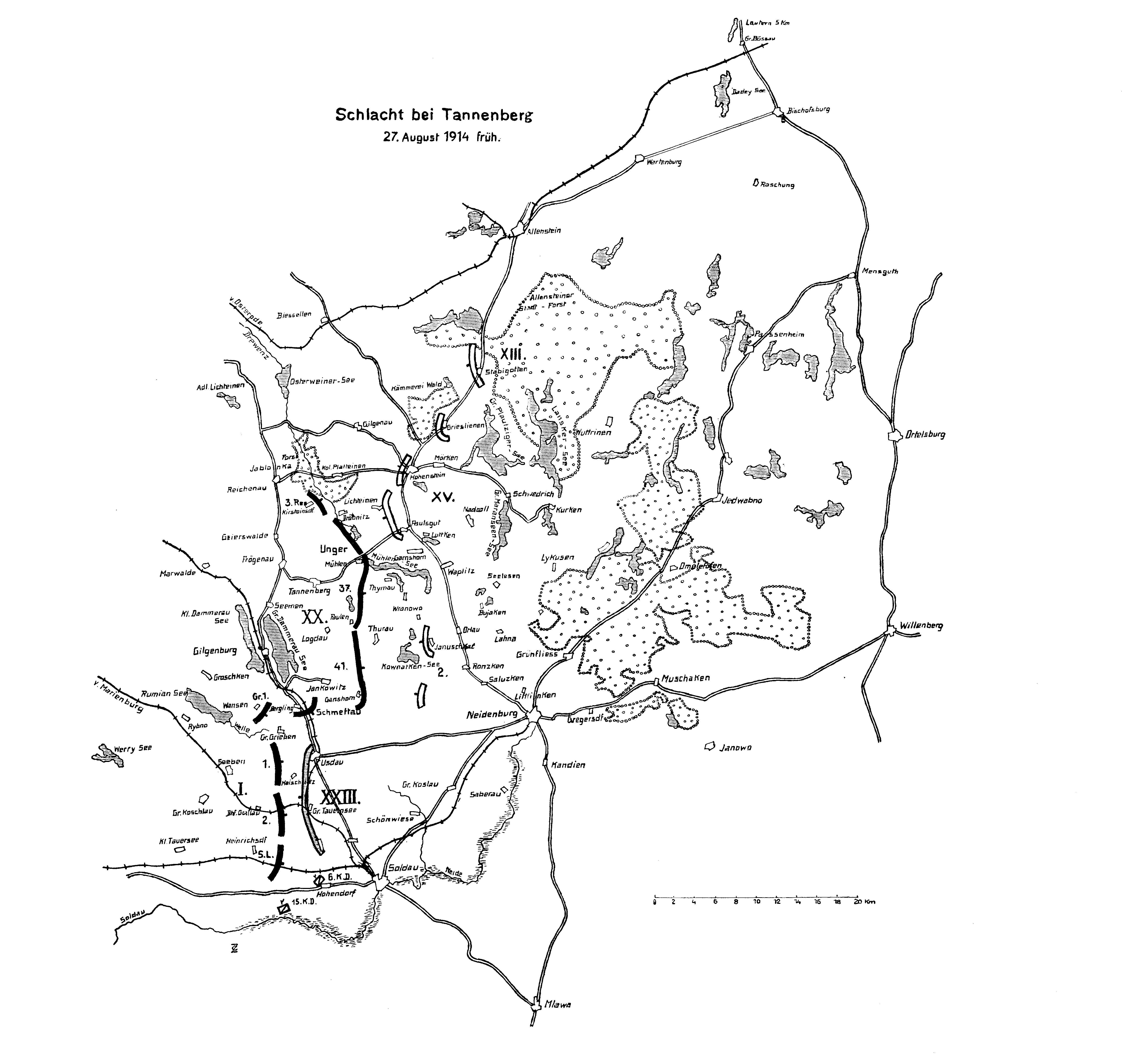 Karte von Tannenbergschlacht am 27.8.1914